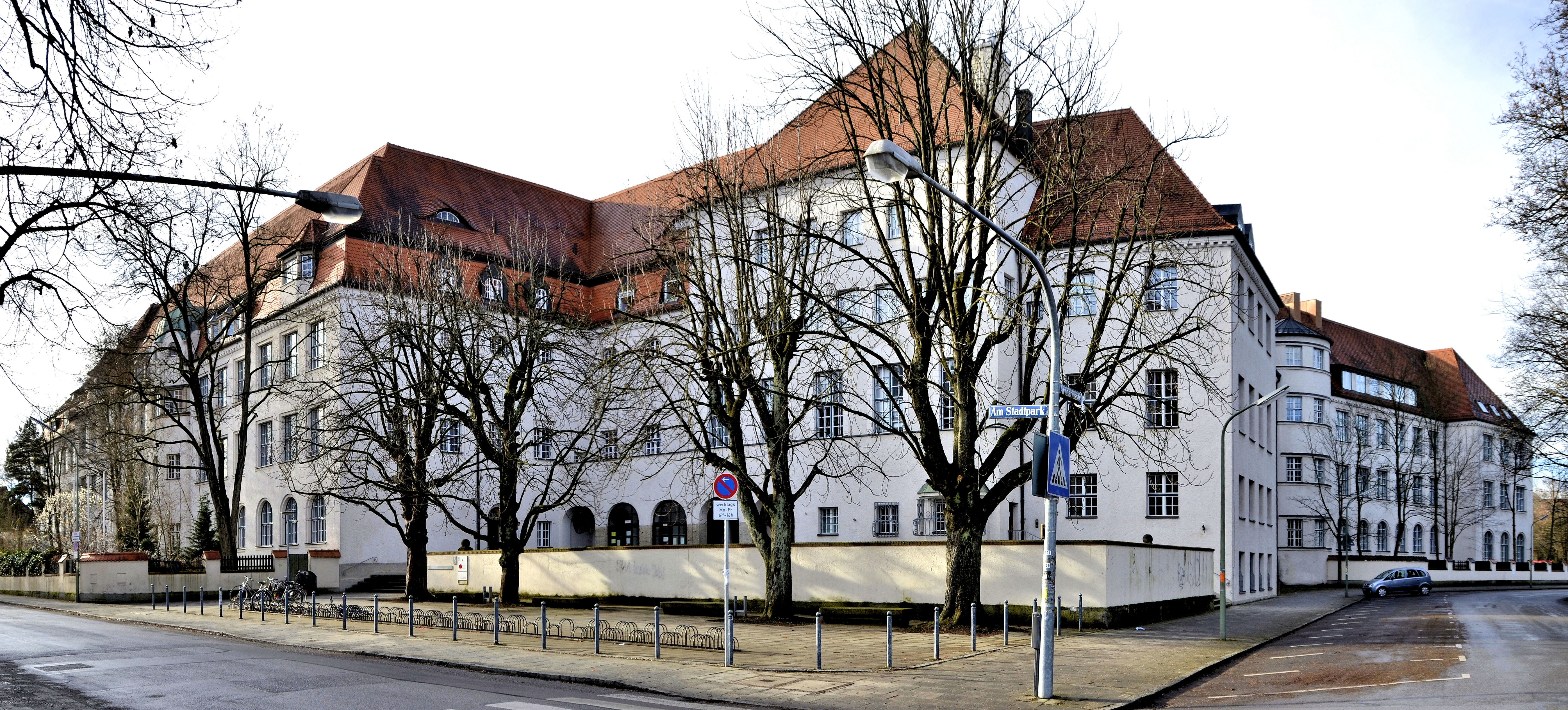 Das Staatsinstitut für die Ausbildung von Fachlehrern Abteilung II, Am Stadtpark 20 in München-Pasing.